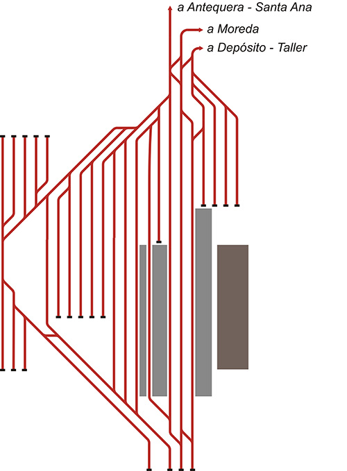 Esquema de la estación de ferrocarril de Granada en primavera de 2010.